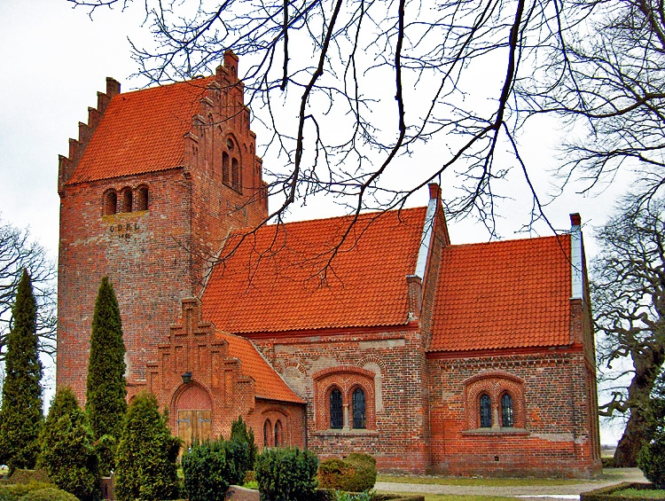 fra syd